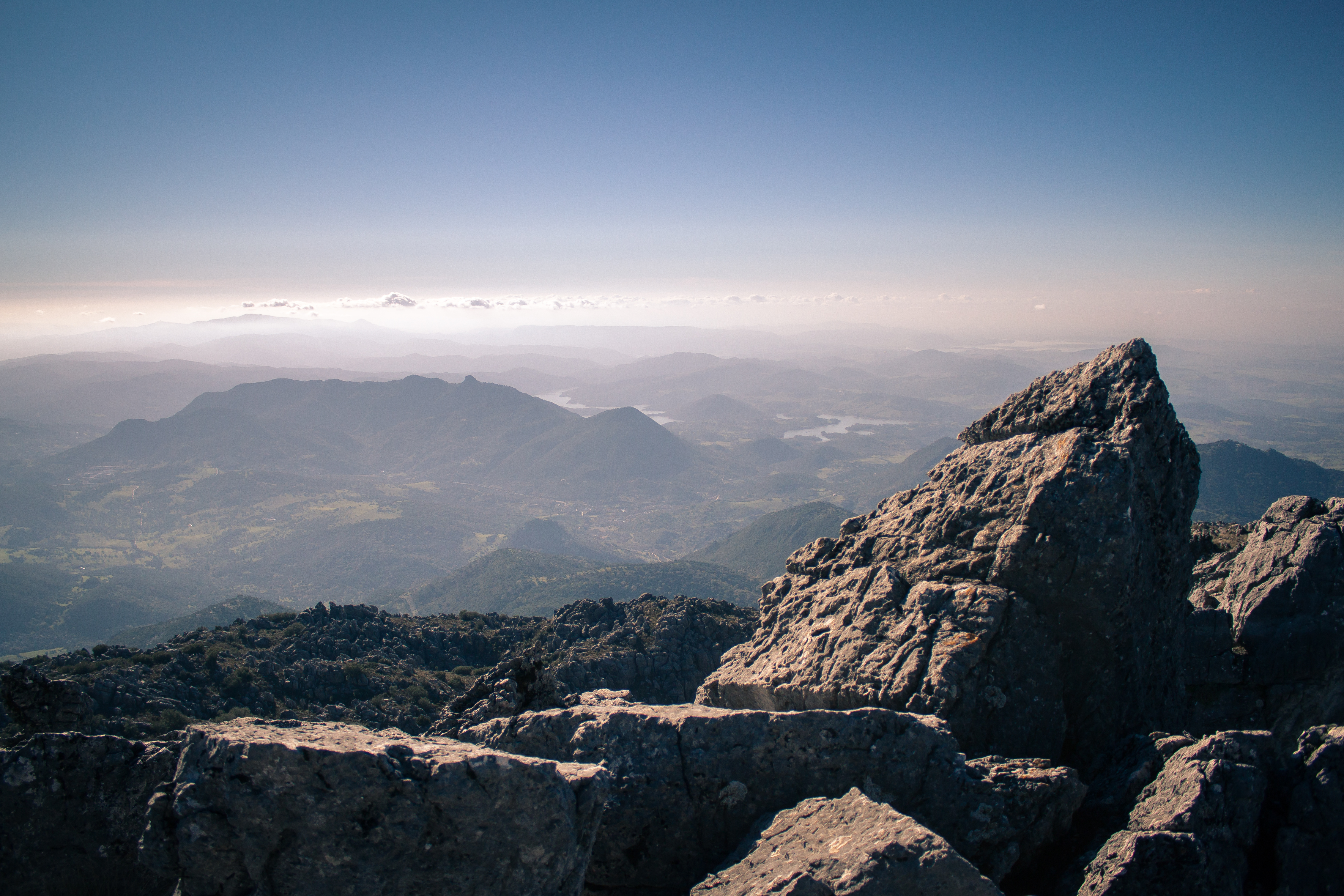 Vista del pico de El Torreón de Grazalema